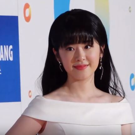 '제 40회 청룡영화상 시상식' 레드카펫이 21일 오후 인천시 중구 운서동 파라다이스시티호텔에서 열렸다.